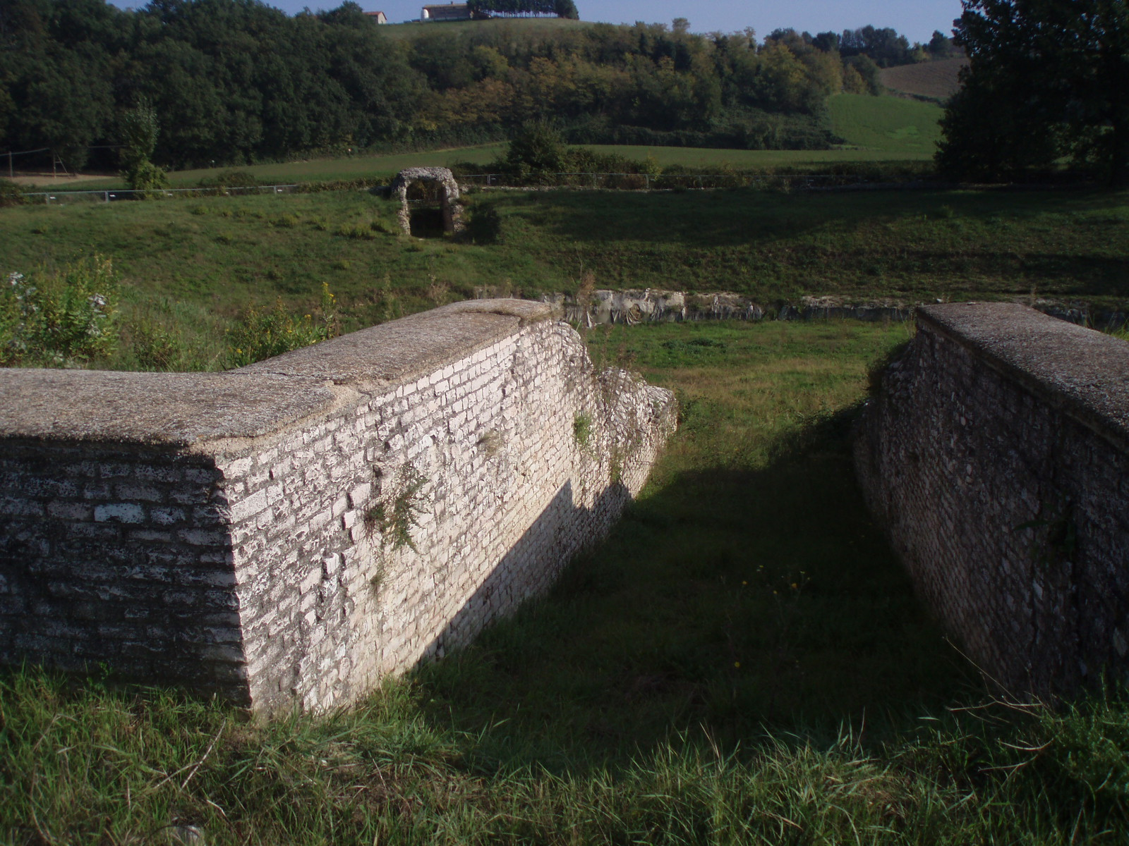 Anfiteatro di Suasa - Ingresso all'arena.JPG